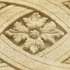 Rennaissance-Akathusrosette am alten Rathaus in Luxemburg Stadt am Krautmarkt (Palais Grand-ducal)